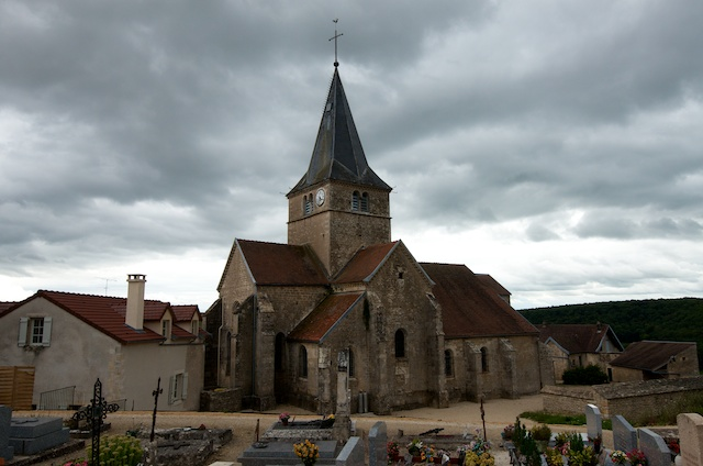 Frôlois : église. Object location47° 31′ 41.16″ N, 4° 37′ 52.32″ E